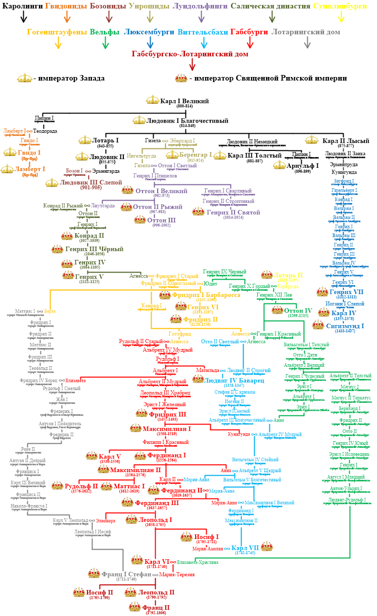 Генеалогическое древо